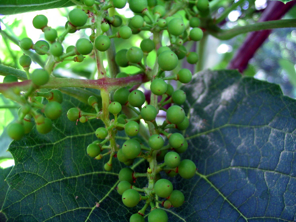 Виноград